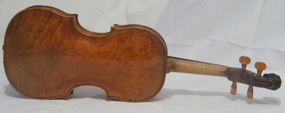 Violin J.Stainer 165? Backside